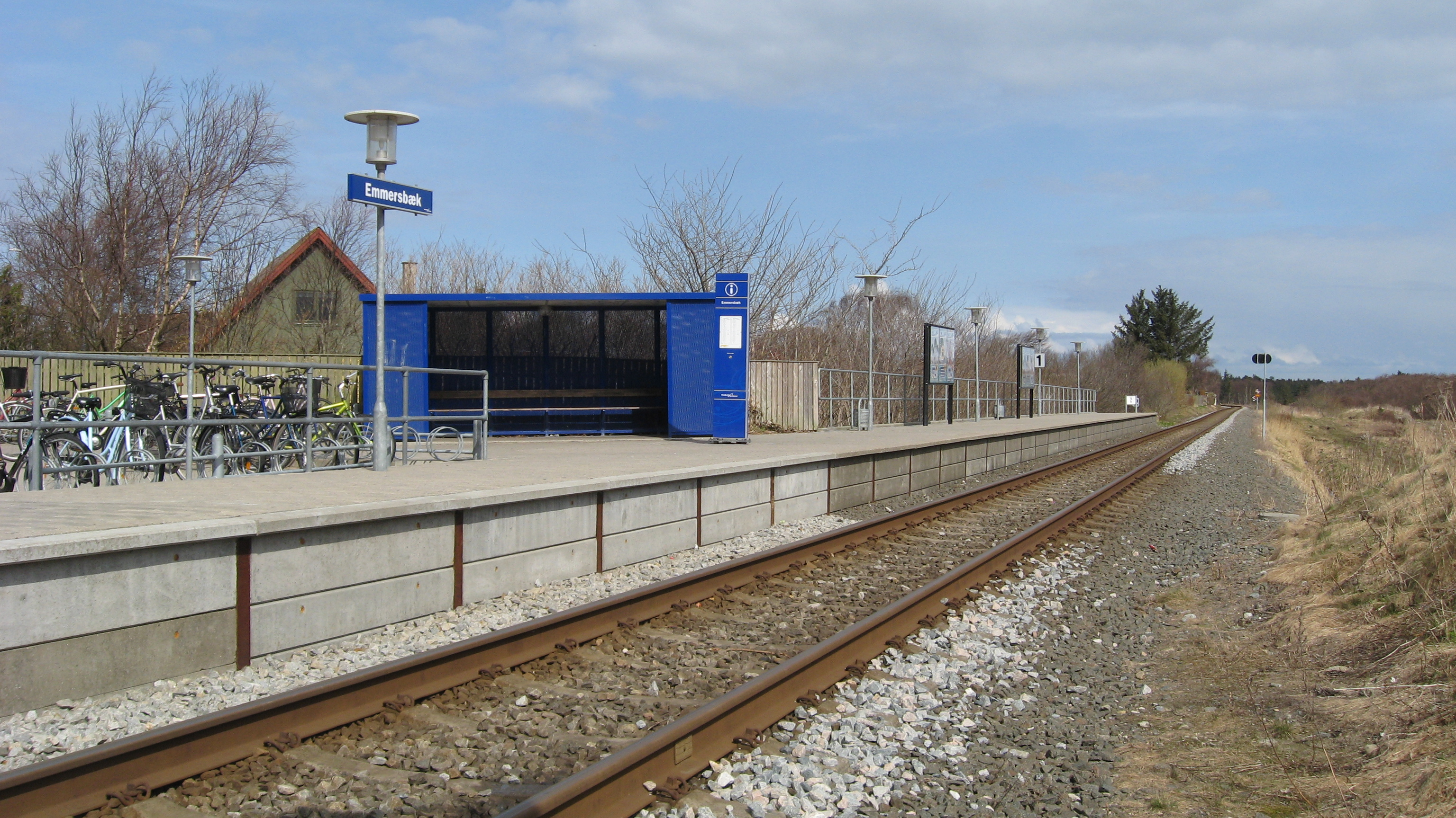 Emmersbæk Trinbræt er en dansk jernbanestation i Emmersbæk, syd for Hirtshals